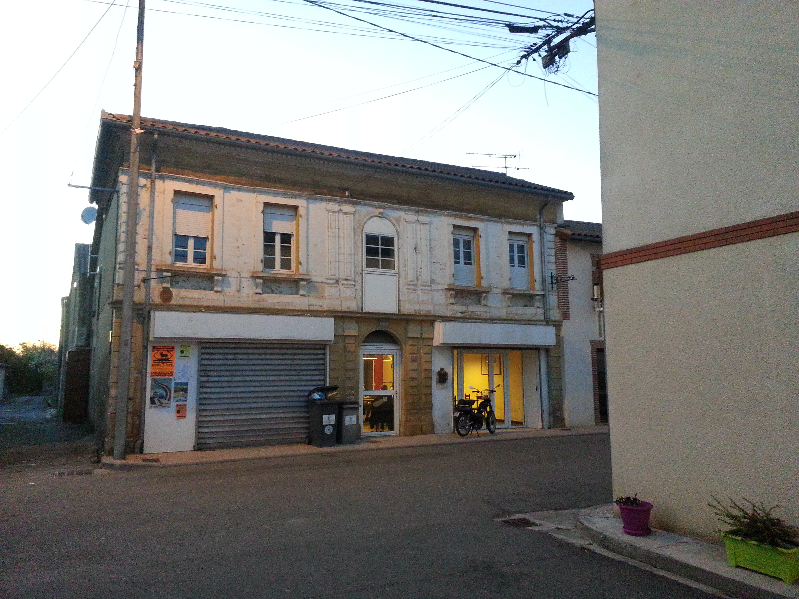 Ancien bar restaurant de Lavelanet de Comminges